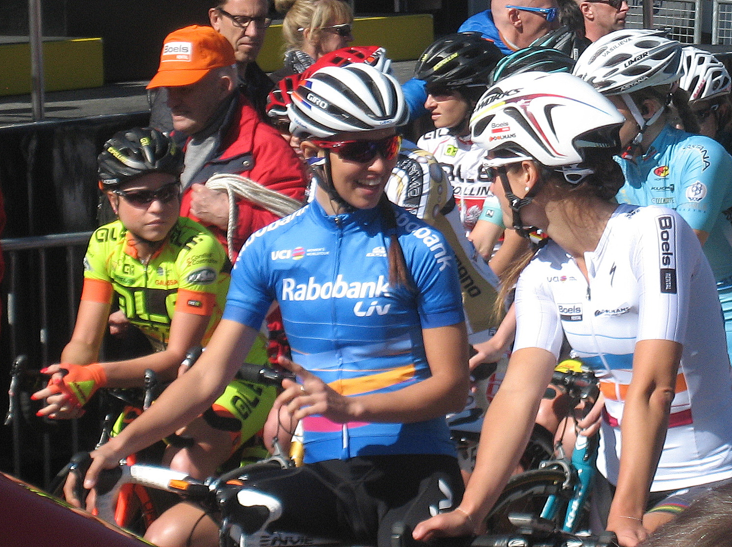 World Tour-leiders Niewiadoma en Armitstead aan start Waalse Pijl 2016